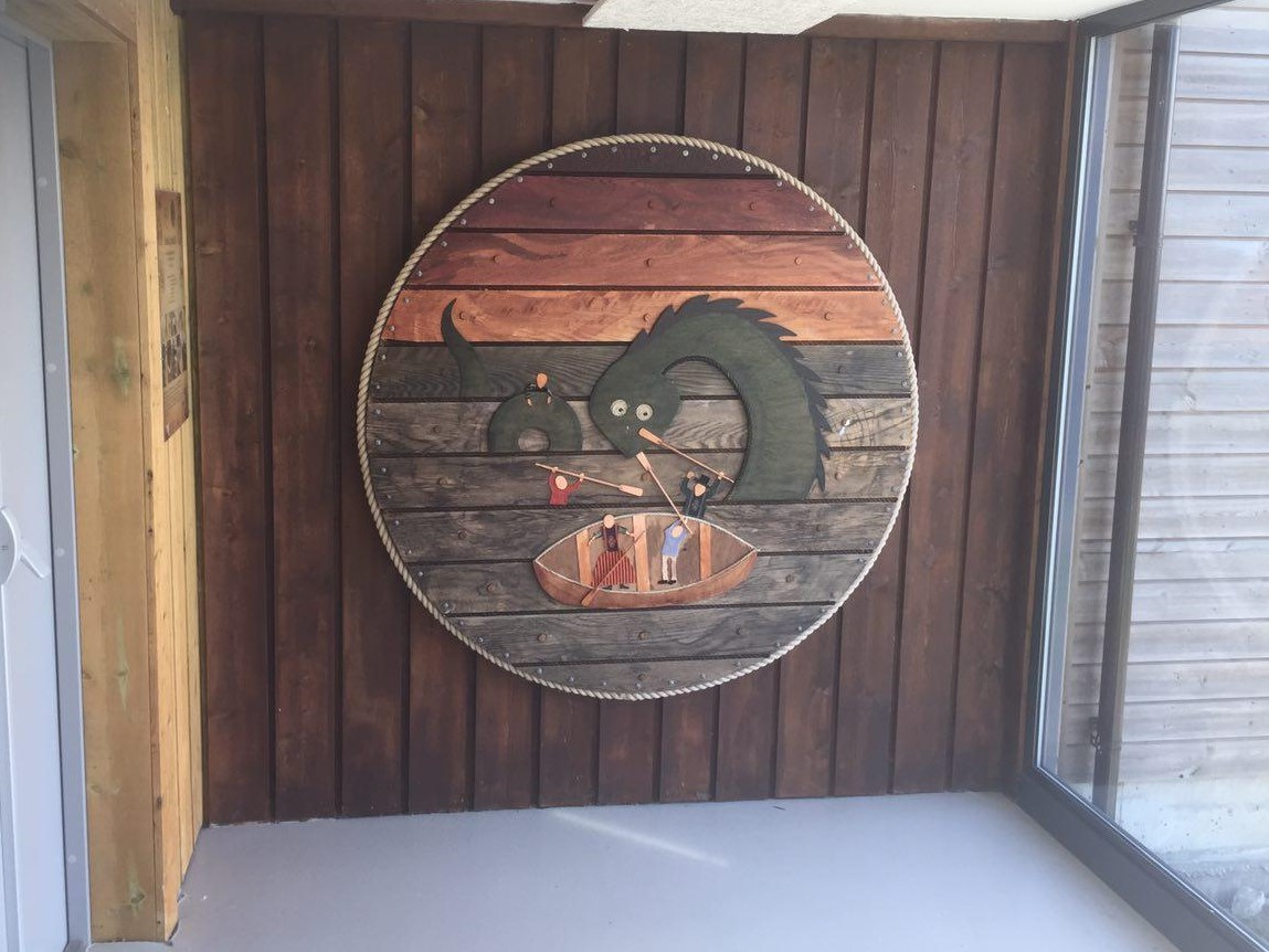 Bildemontasje på Stranda skule som viser den sagnomsuste sjøormen i innsjøen Kørelen